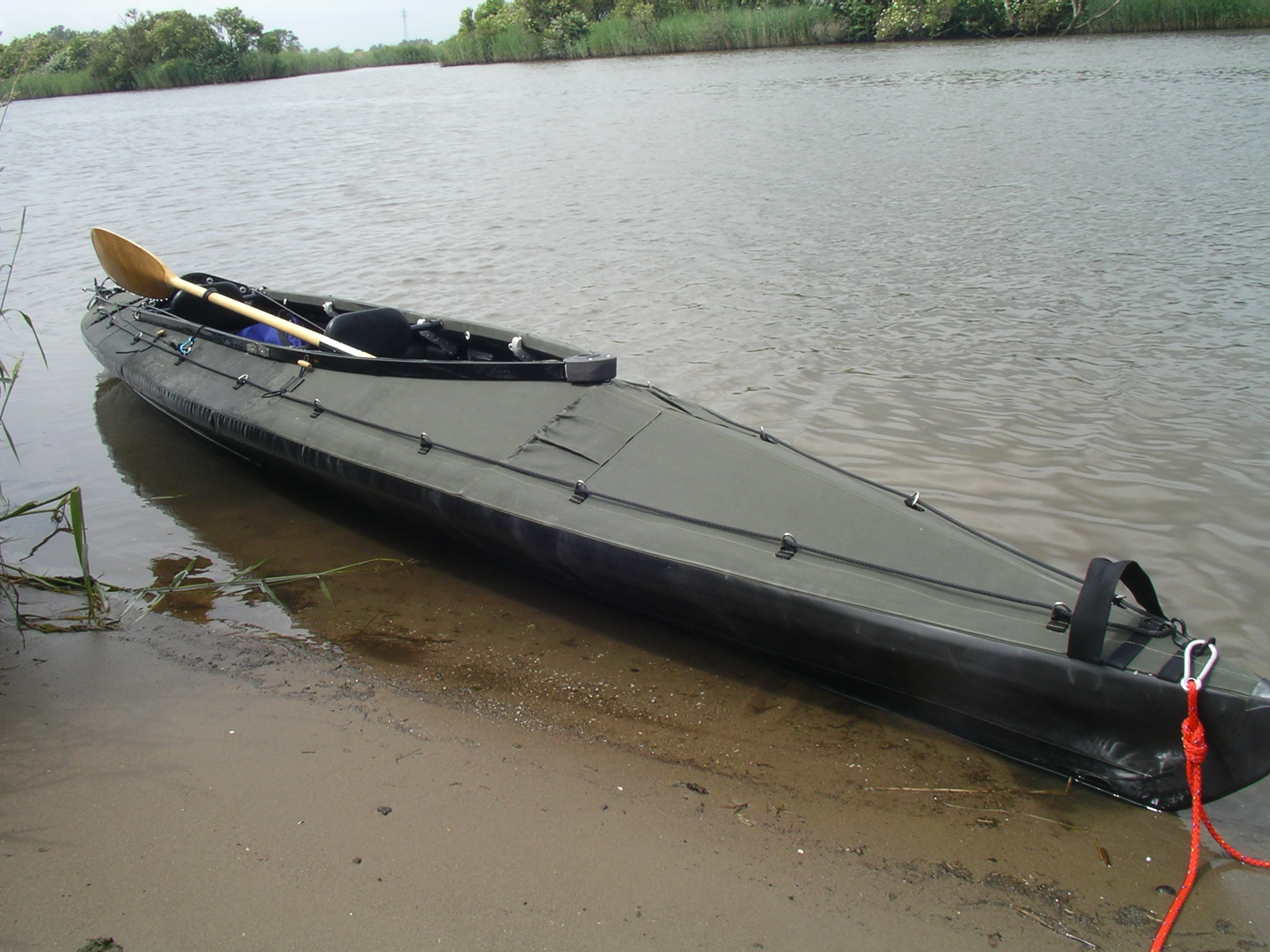 Klepper Aerius Quattro vouwkano, foto gemaakt door Kees van der Meij (Caseman) op 16 juni 2004 in de Brabantse Biesbosch Categorie:Afbeelding schip